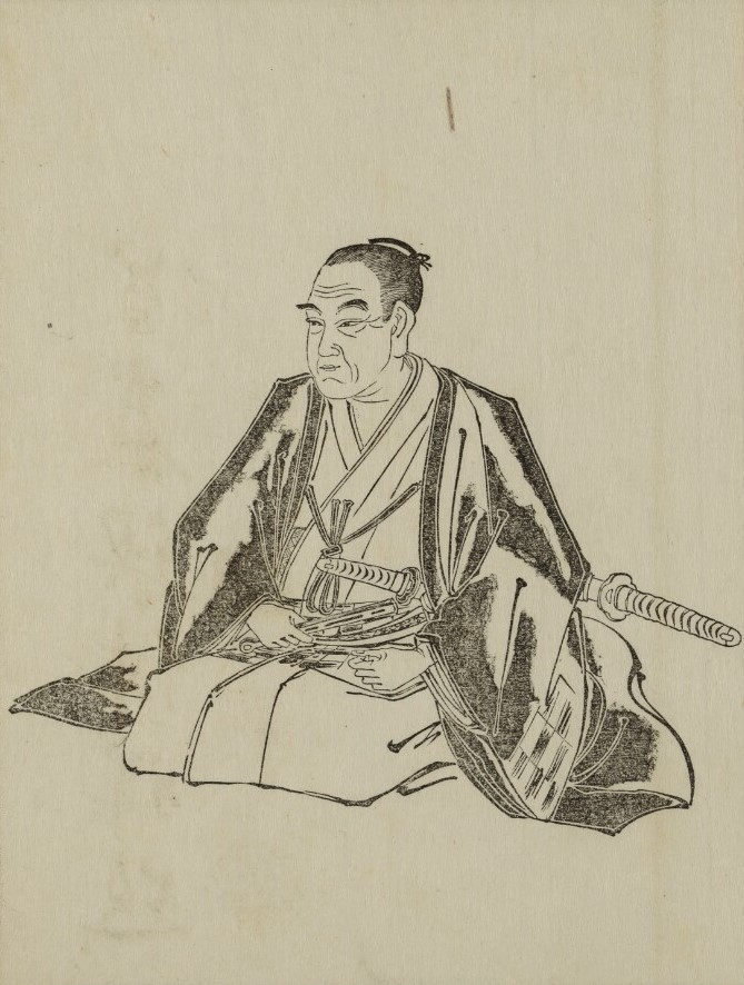 垣内己山『間窓随筆』口絵